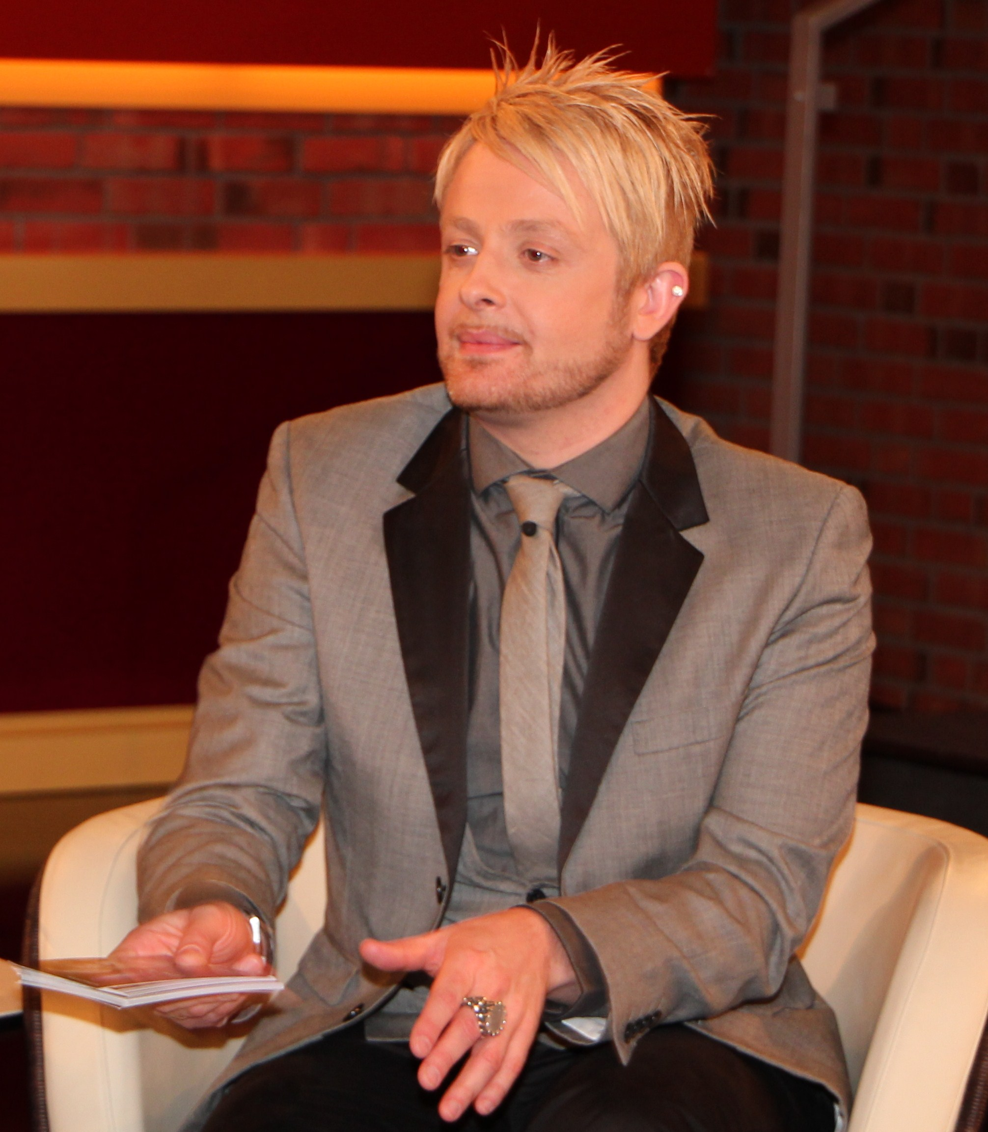 Fernsehmoderator, Musicaldarsteller, Musiker, Entertainer und ehemaliges Mitglied der Band Bro’Sis